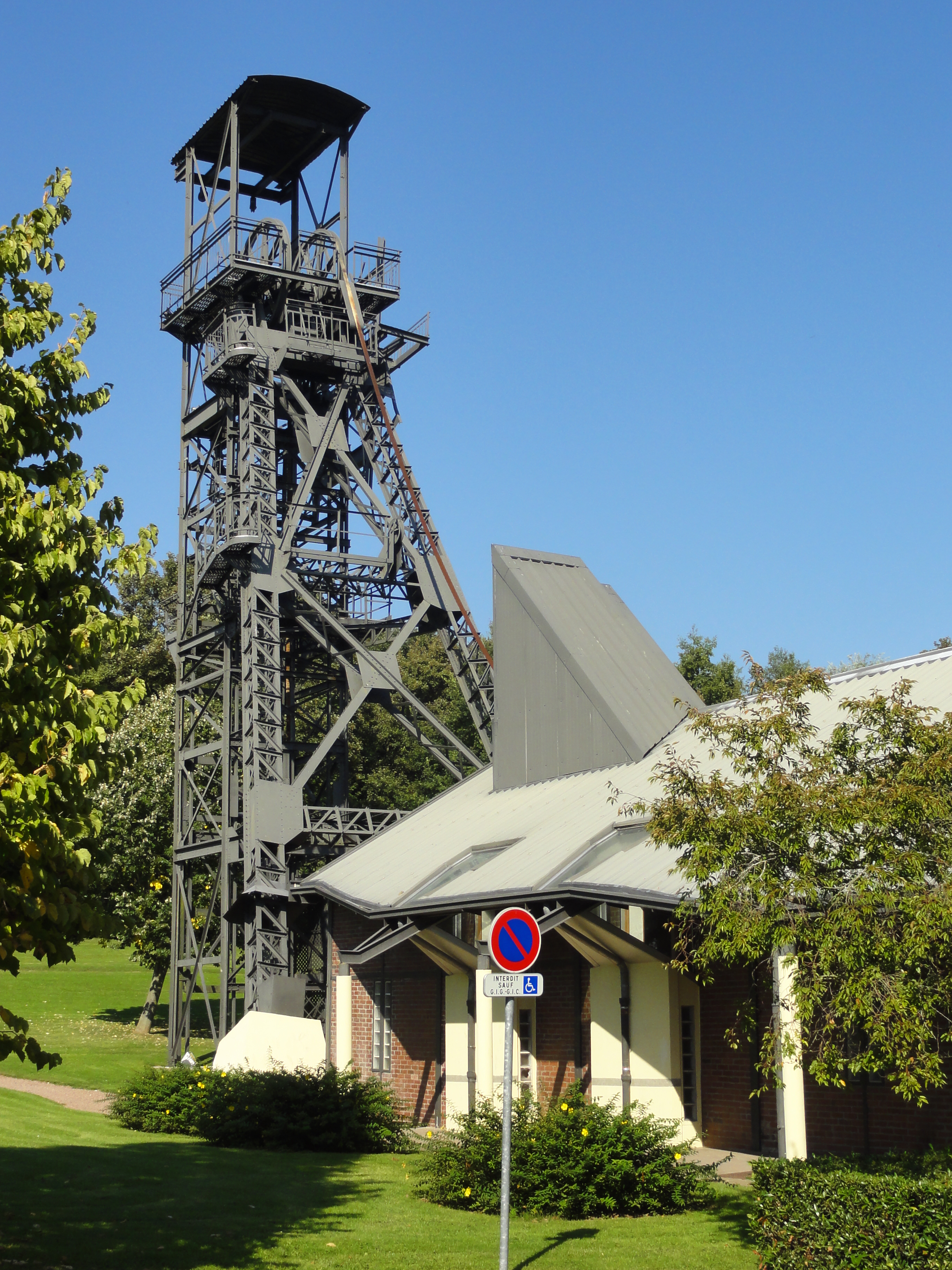 La fosse no 2 dite Saint-Émile de la Compagnie des mines de Marles était un charbonnage du bassin minier du Nord-Pas-de-Calais constitué d'un seul puits situé à Marles-les-Mines, Pas-de-Calais, Nord-Pas-de-Calais, France. L'avaleresse no 1 est localisée sur le site. Le chevalement de la fosse no 2 avec les parties anciennes du bâtiment de la machine d'extraction sont inscrits aux monuments historiques le 6 mai 1992. La fosse est également inscrite sur la liste du patrimoine mondial par l'Unesco le 30 juin 2012 et y constitue le site no 101. .